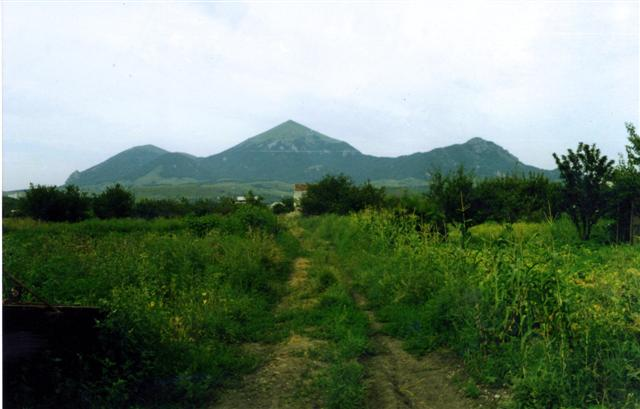 гора Бештау, г. Пятигорск, Ставропольский край